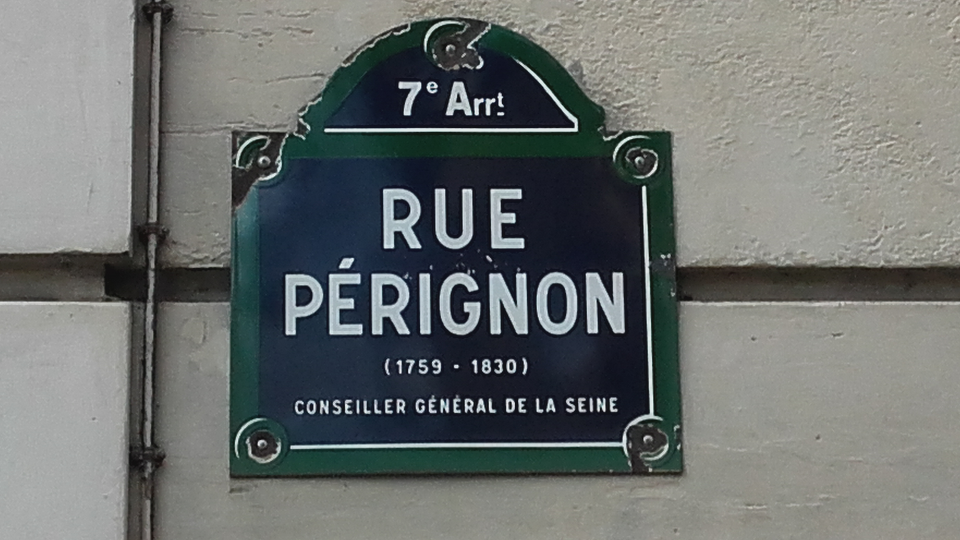 Plaque de la rue Pérignon à Paris, France